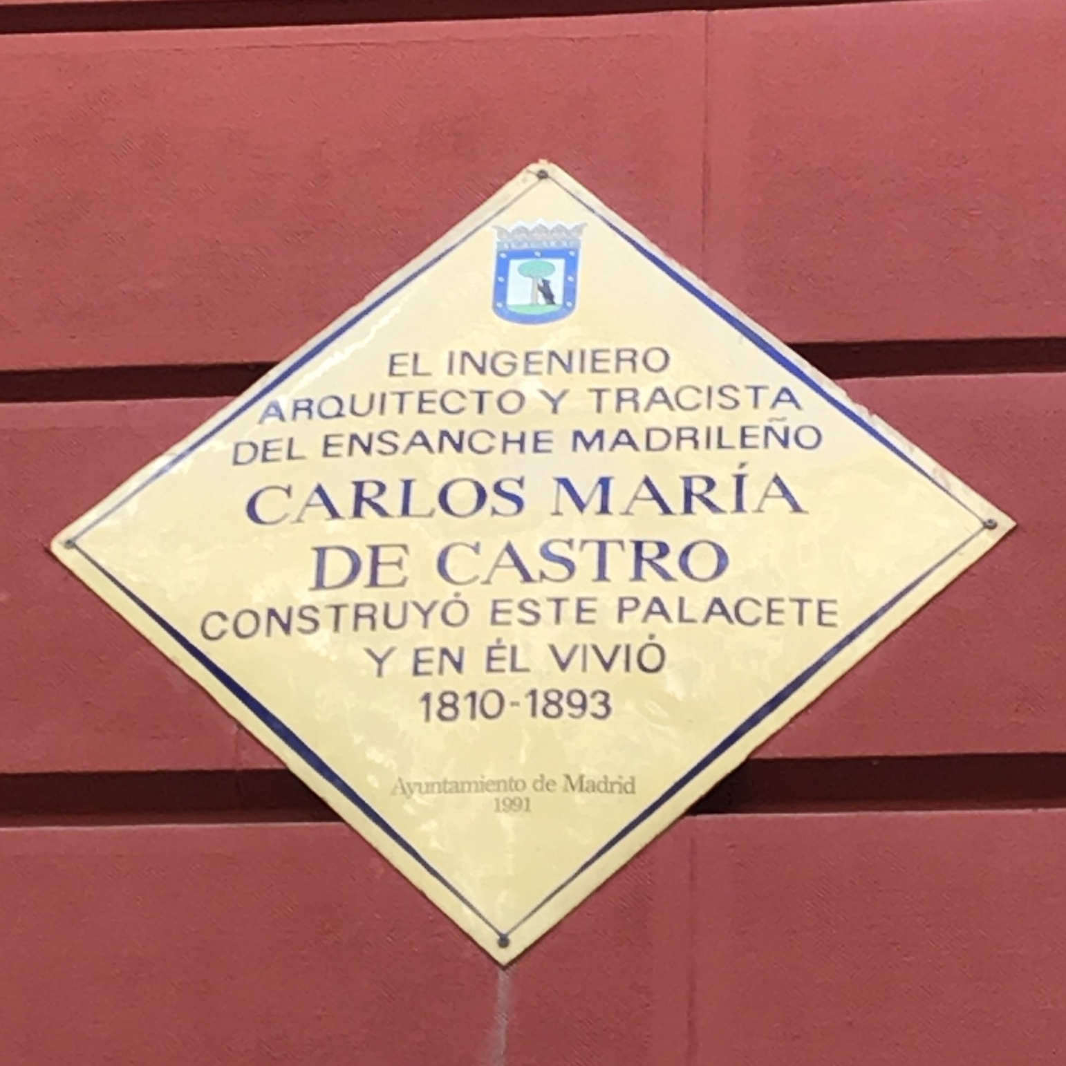 El ingeniero, arquitecto y tracista del Ensanche madrileño Carlos María de Castro construyó este palacete y en él vivió. 1810-1893.